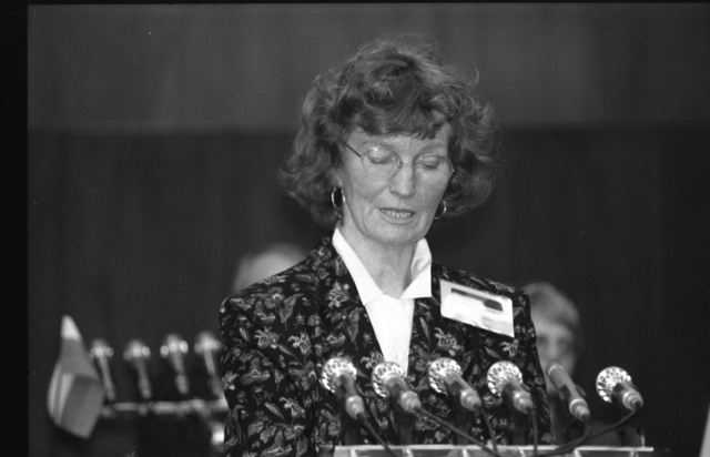 Professor Randi Rønning Balsvik under Vårkonferansen i Arkhangelsk, 1993.